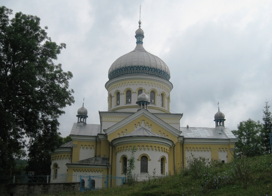 Церква в селі Грасимів